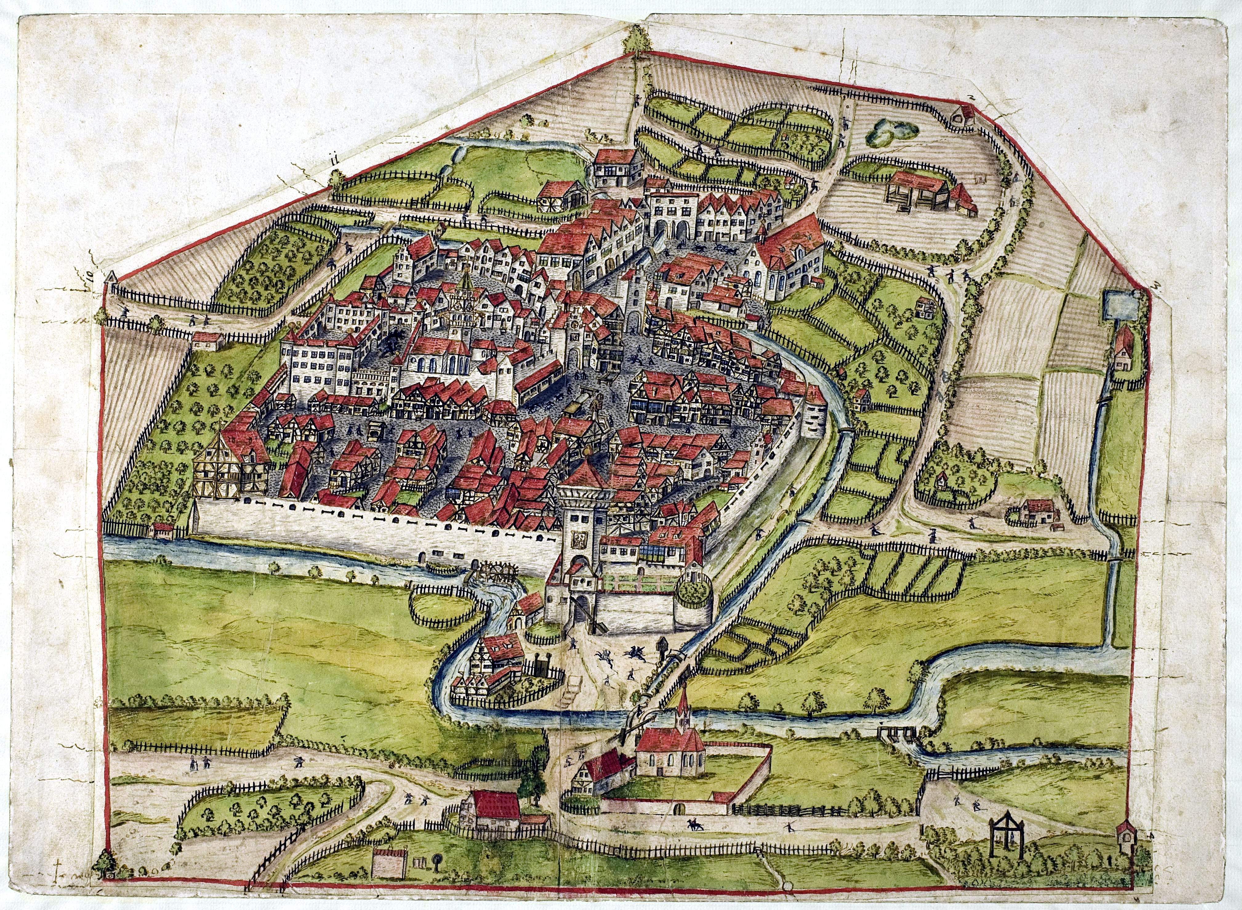 Darstellung des Etters Meßkirch, um 1575 (Generallandesarchiv Karlsruhe, Inv. Nr. J/B Meßkirch 1)